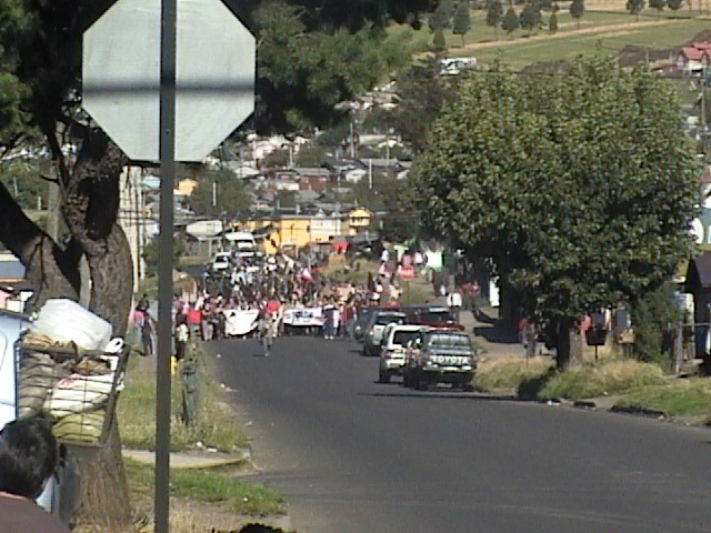 Marcha en Coyhaique (Chile) en el marco de las protestas en Aysén de 2012.